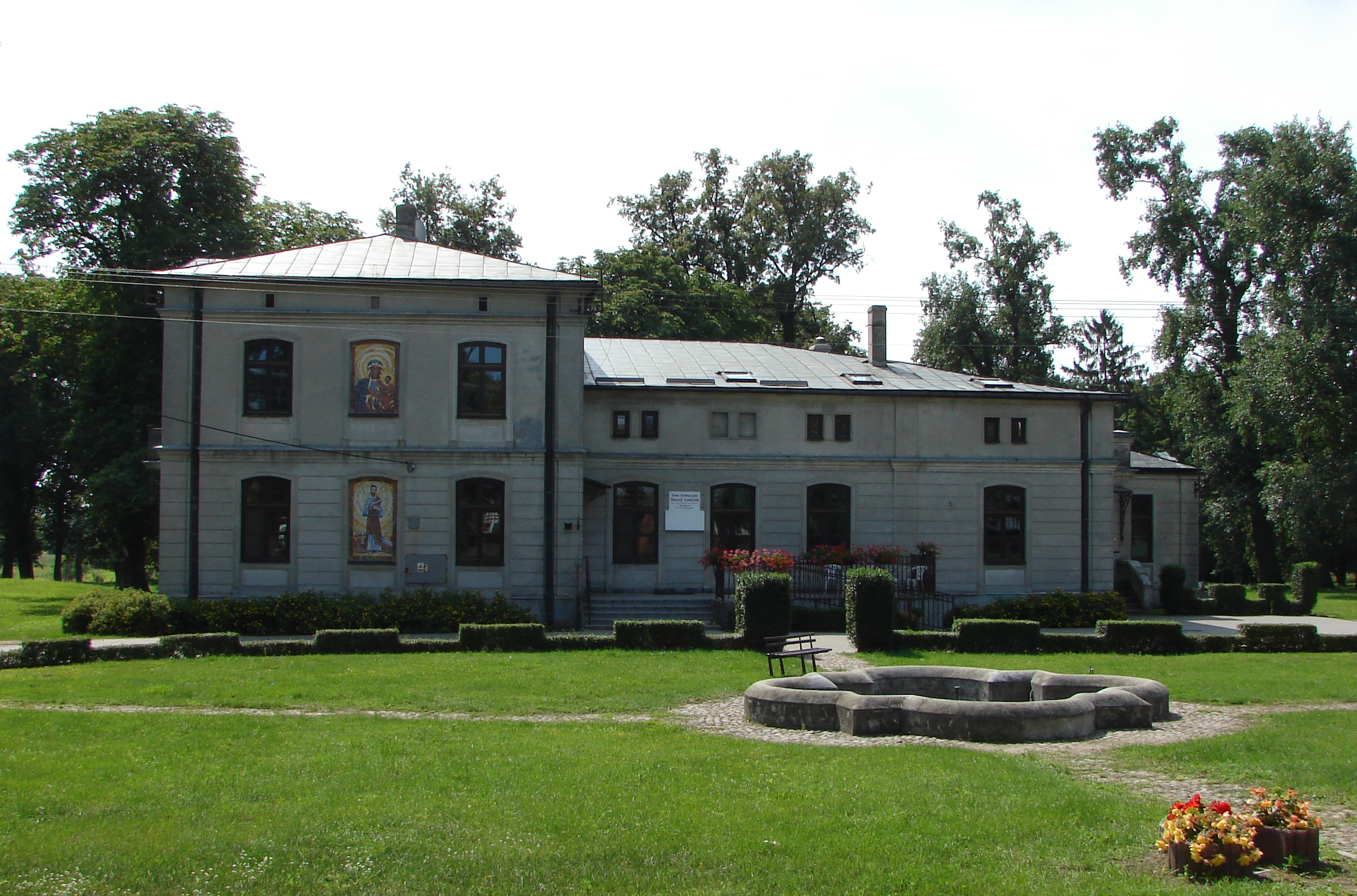 Strzegocin, zespół dworski, 2 poł. XIX, XX